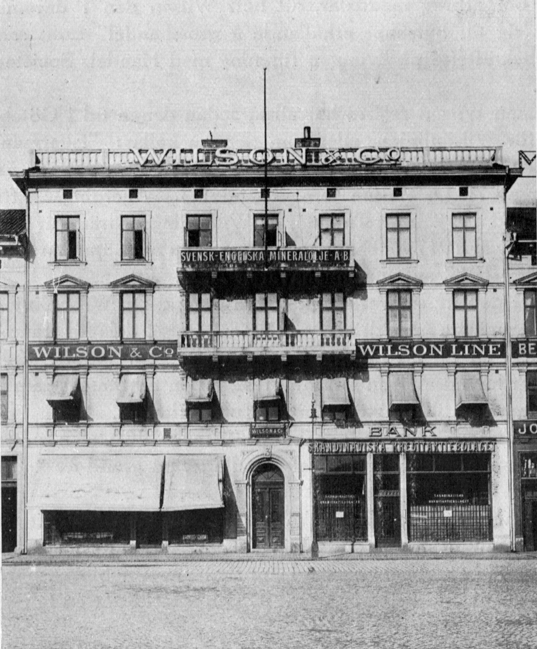 Wilson & Co. Head office. Järntorget 3, Göteborg.